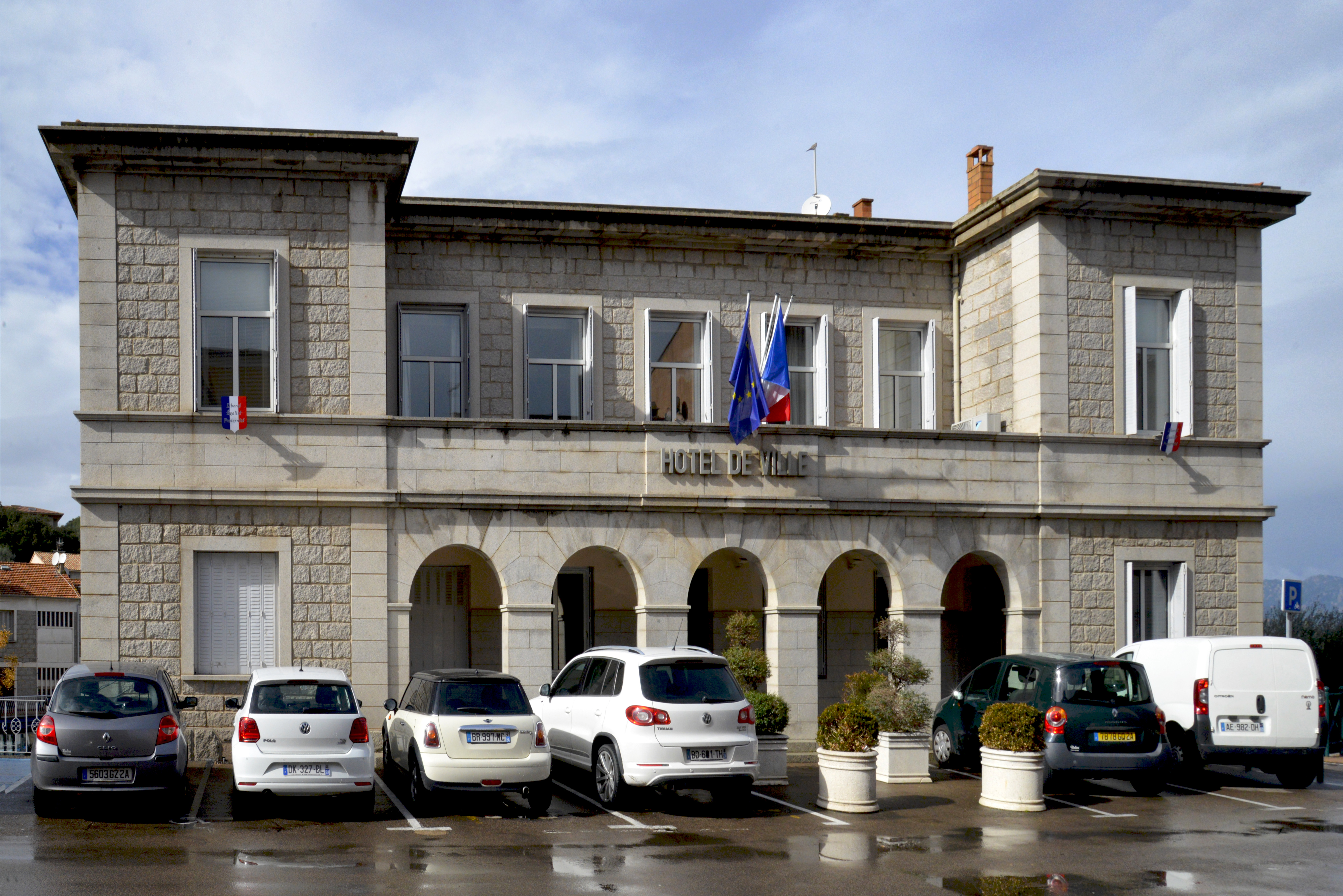 Porto-Vecchio, (Corse-du-Sud) - L'hôtel de ville